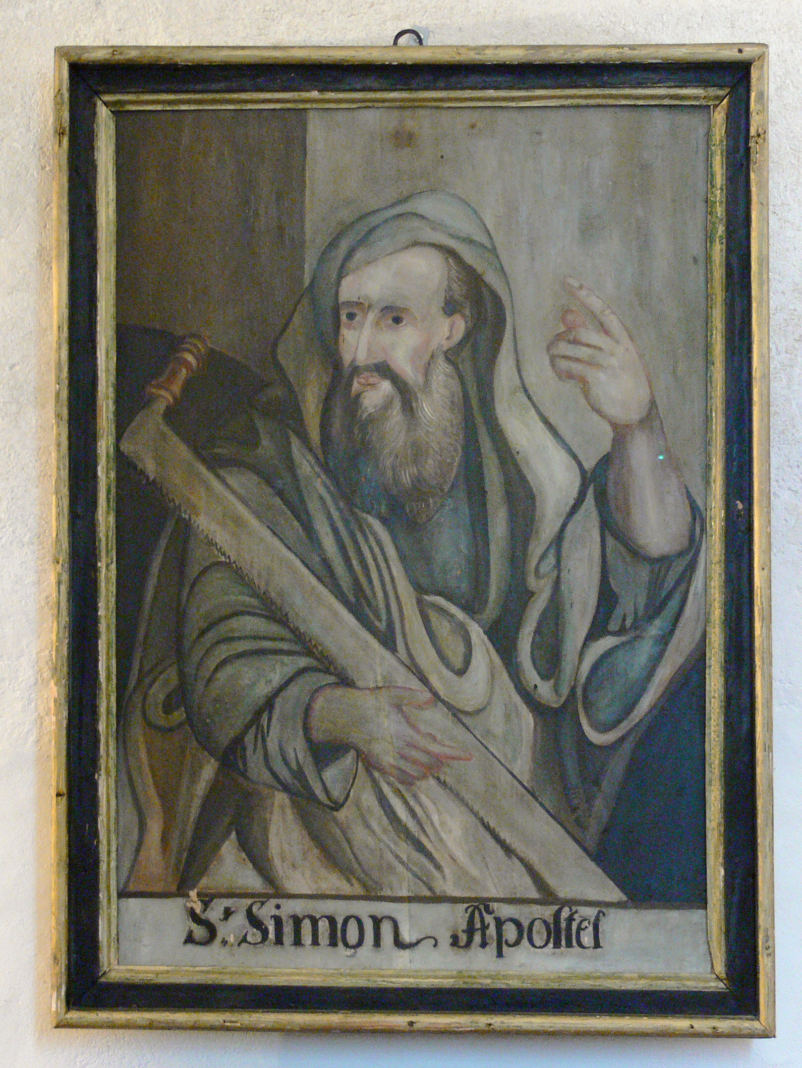 Nusplingen, Zollernalbkreis: Ehem. Friedhofskirche St. Peter und Paul Tafebild "Apostel Simon (Zelotes)", Ende 17. Jahrhundert (im 19. Jh. übermalt(?))